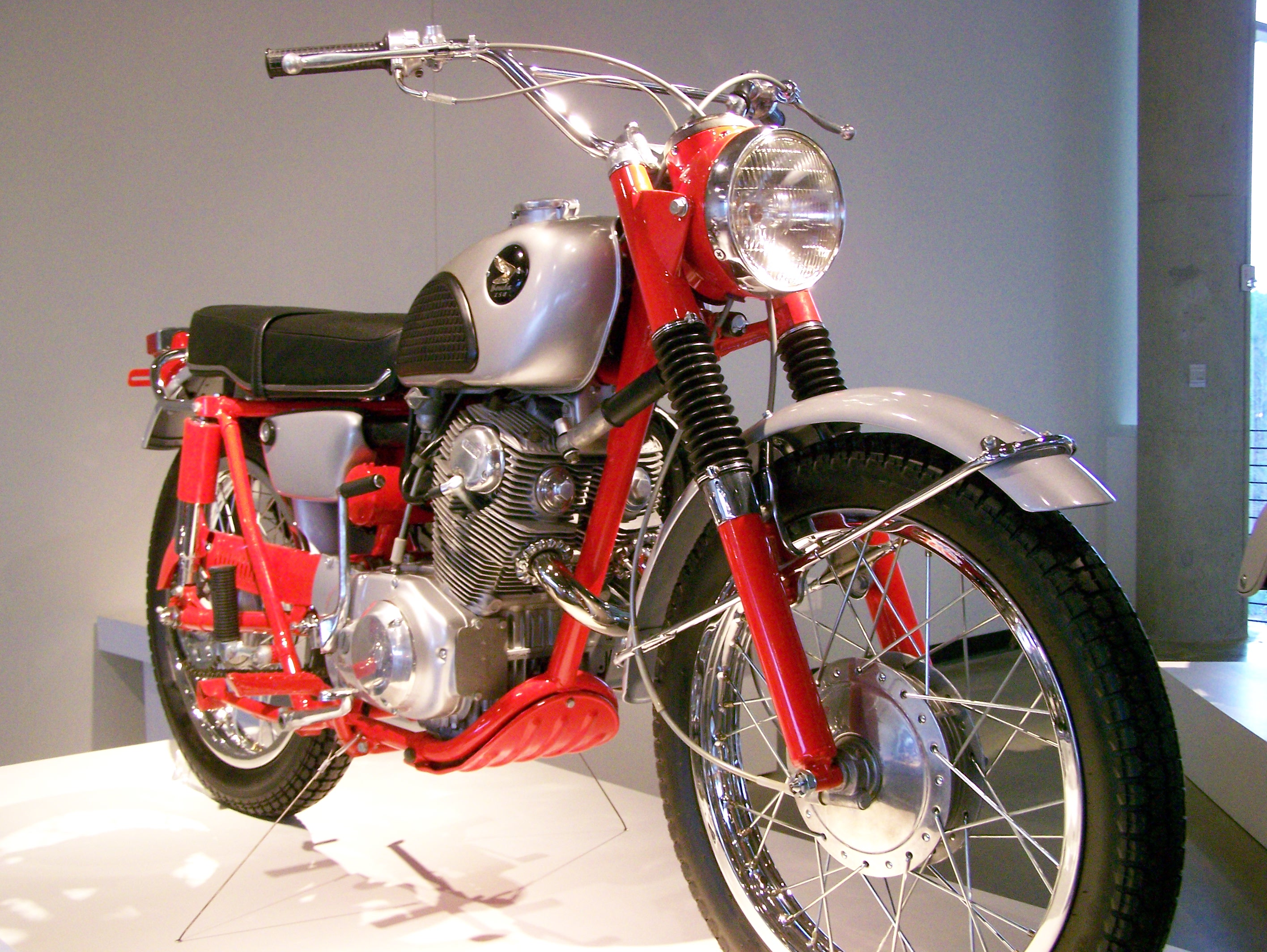 Barber Vintage Museum_205 Honda CL72